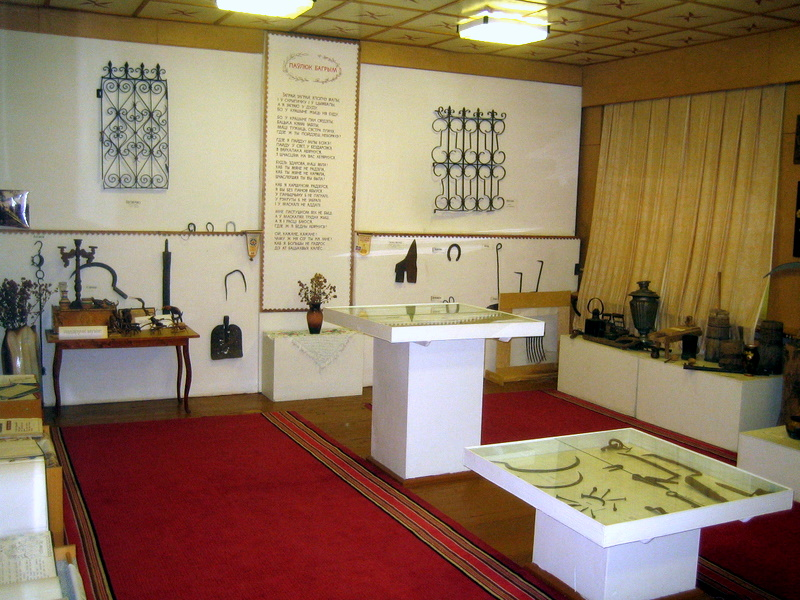 Музей народнага мастацтва і рамёстваў імя П. Багрыма ў аграгарадку Крошын